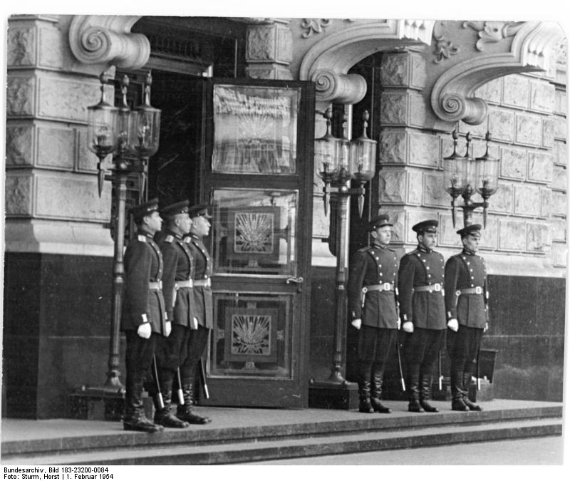 Berlin, Sowjetische Botschaft, Eingang, Ehrenwache Zentralbild Sturm -1.2.1954 -7.Tagung der Aussenminister. In der Woche vom1.bis zum 6.Februar 1954 tagen die vier Aussenminister im Amtssitz des Hohen Kommisars der UdSSR in Deutschland in Berlin, Unter den Linden.UBz.Vor Beginn der Sitzung.Die sowjetische Ehrenwache am Portal des Amtssitzes.